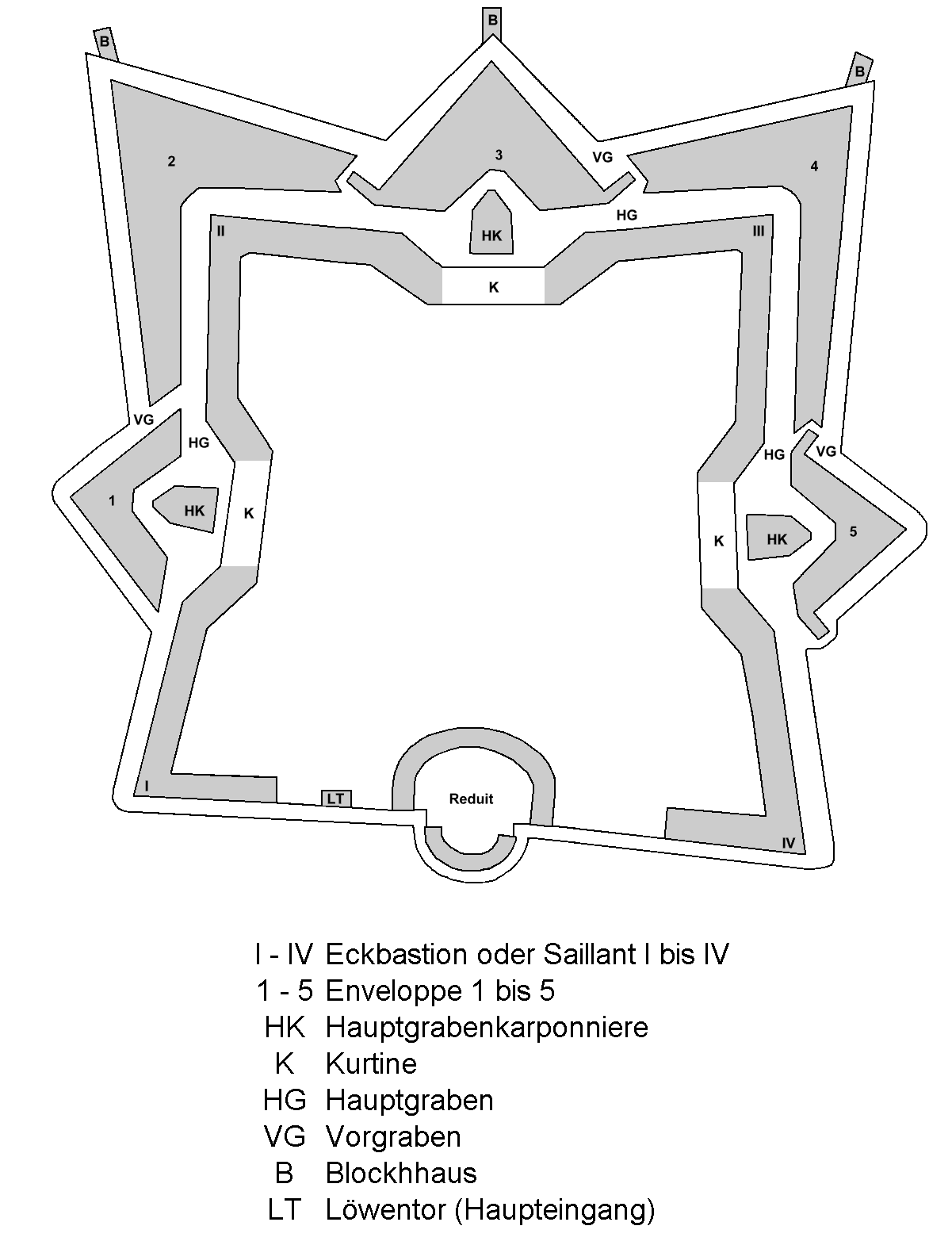 Vereinfachte Grundrisszeichnung der Feste Kaiser Alexander in Koblenz; Zustand von etwa 1840; weggelassen wurden die Grabenstreichen des Haupt- und Vorgrabens, die Minenhorchgänge, die offenen Geschützstellungen auf den Bastionen und der Enveloppen sowie die beiden Mörserbatterien.